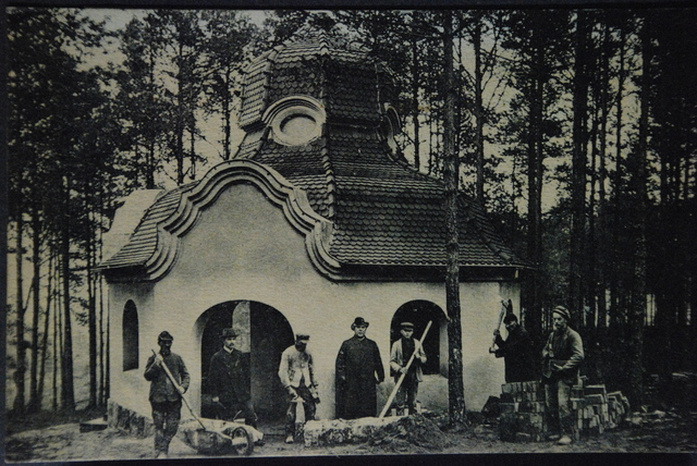 Ksiądz infułat Józef Szydzik przy budowie kaplicy Karwarii we Wielu